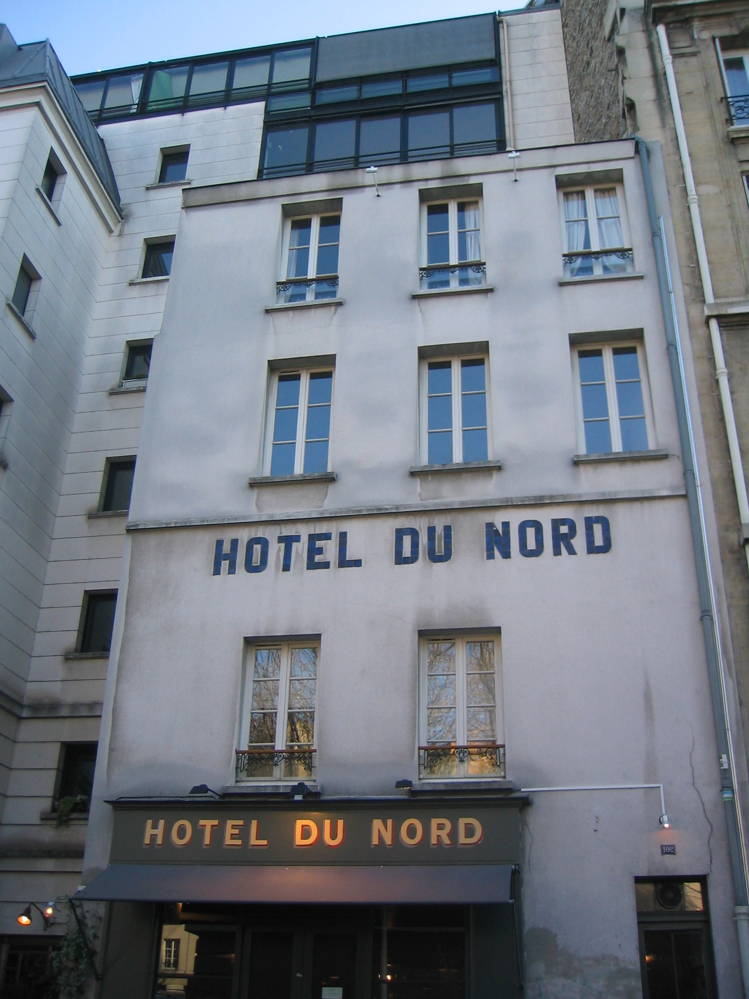 L'Hôtel du Nord à Paris. Alexandre Trauner s'en sest inspiré pour créer le décor du film Hôtel du Nord de Marcel Carné, mais le film n'y a pas été tourné. L'hôtel a été reconstitué en studio.